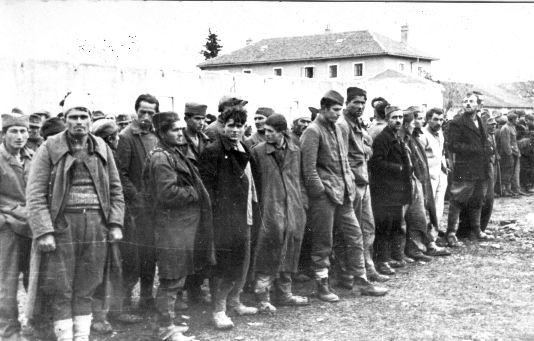 Srpskohrvatski / српскохрватски: Zarobljeni saborci Nemci, četnici i ustaše u borbi za Knin, 1944.